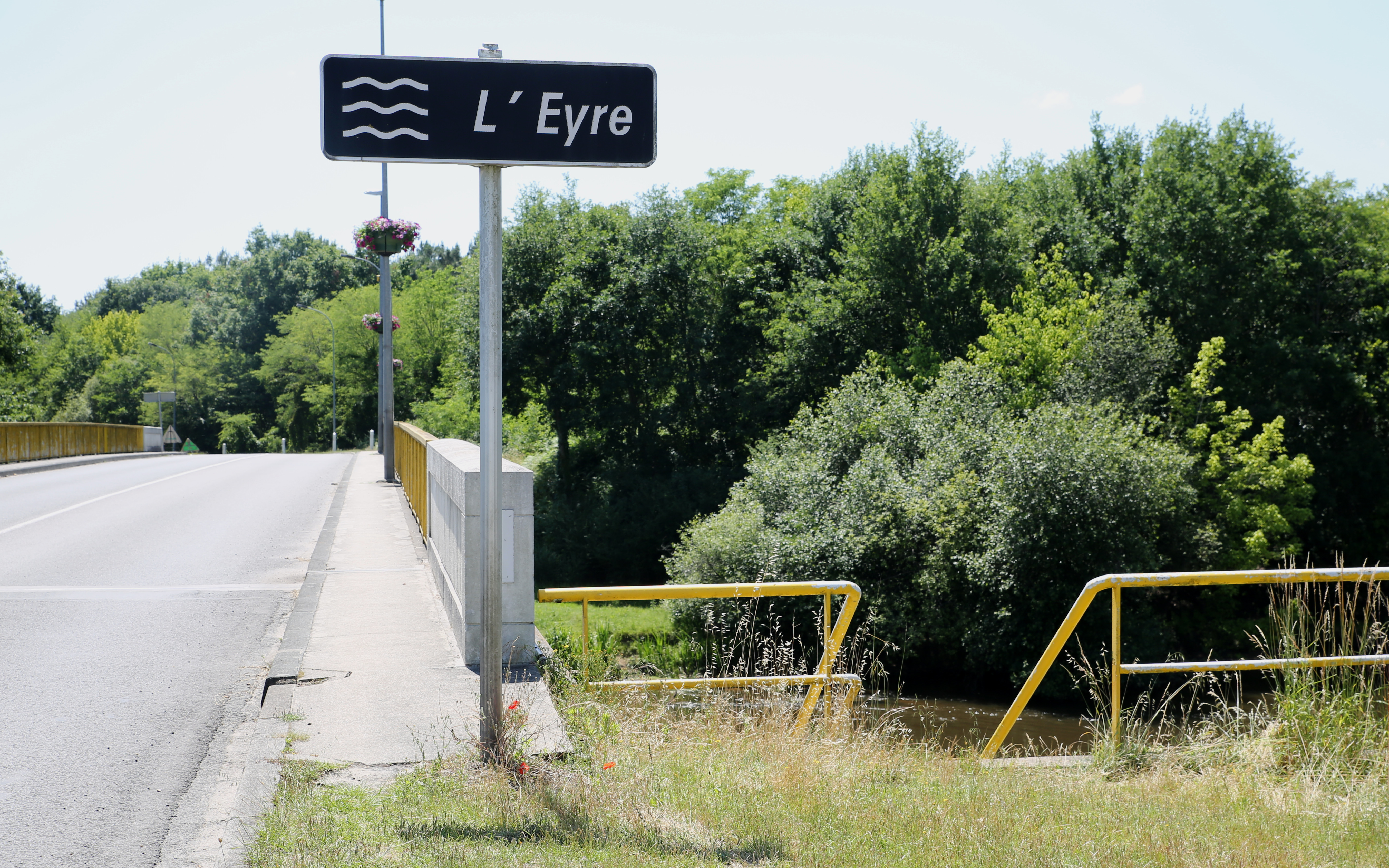 Pont sur l'Eyre à Mios.